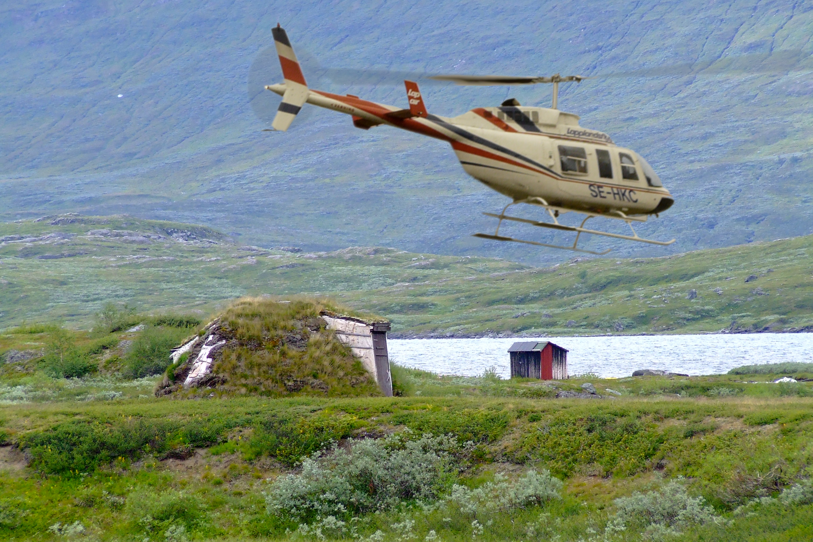 Helikopter im Steigflug über einer Kåta in Arasluokta (Padjelanta-Nationalpark, Schweden)